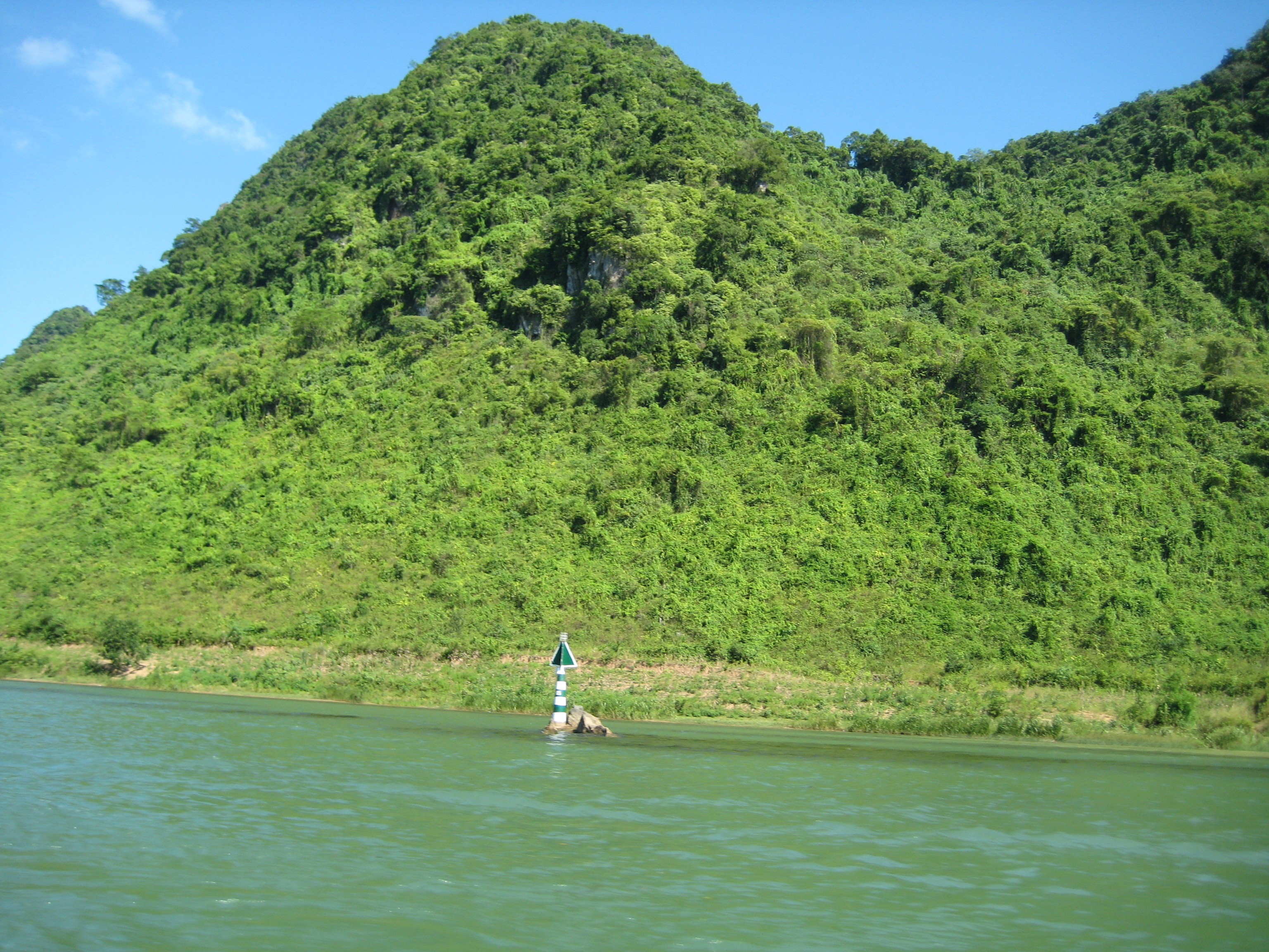 Phong Nha-Ke Bang National Park in Vietnam